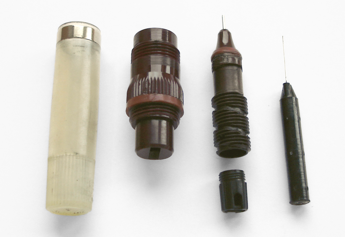 Tuschefüller von Rotring um 1985, Strichstärke 0,5mm, zur Reinigung demontiert. Dieses Schreibgerät war nachfüllbar und hatte keine auswechselbare Tuschepatrone.